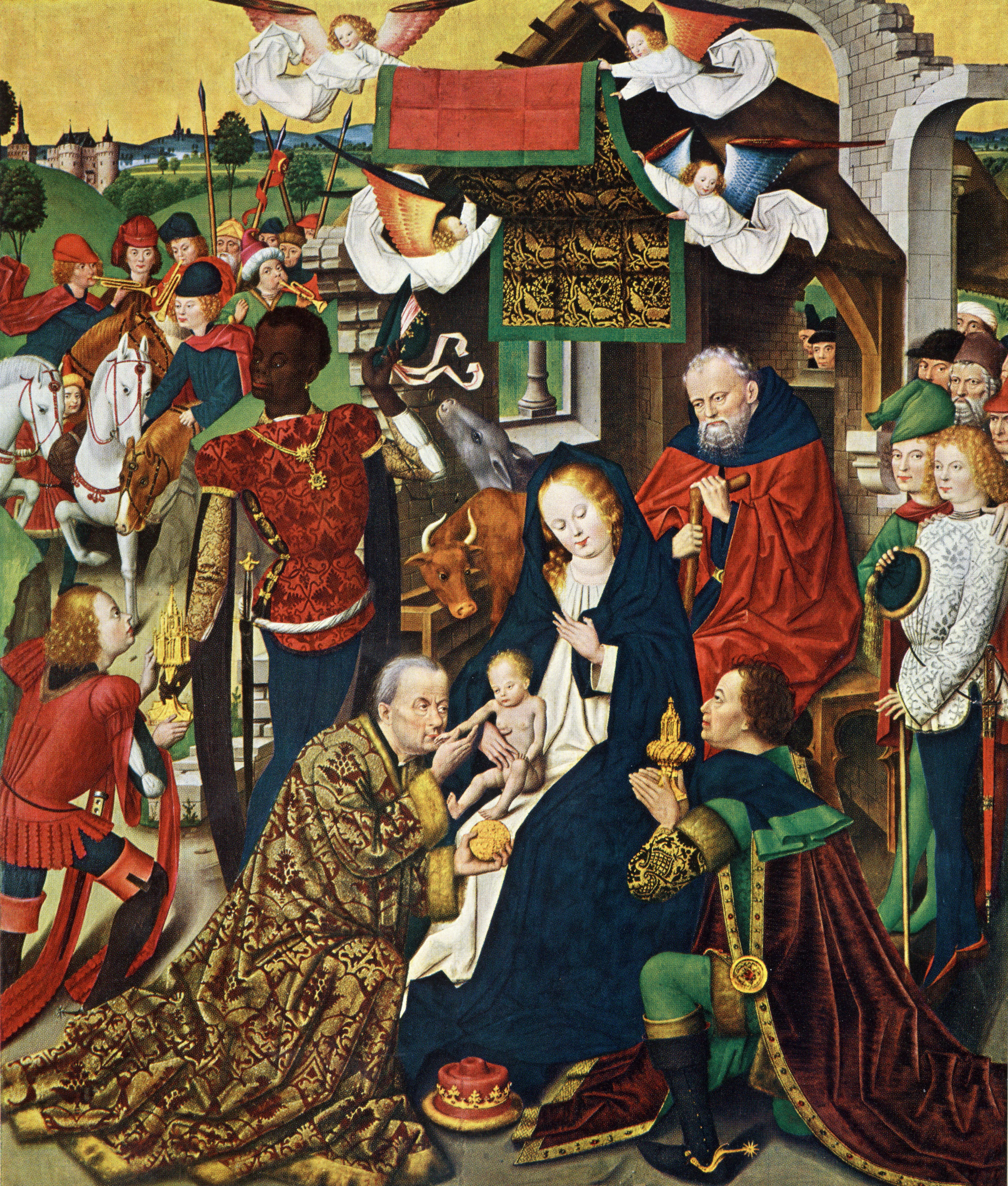 Dortmund Propsteikirche, Derick Baegert Altarbild, rechte Tafel